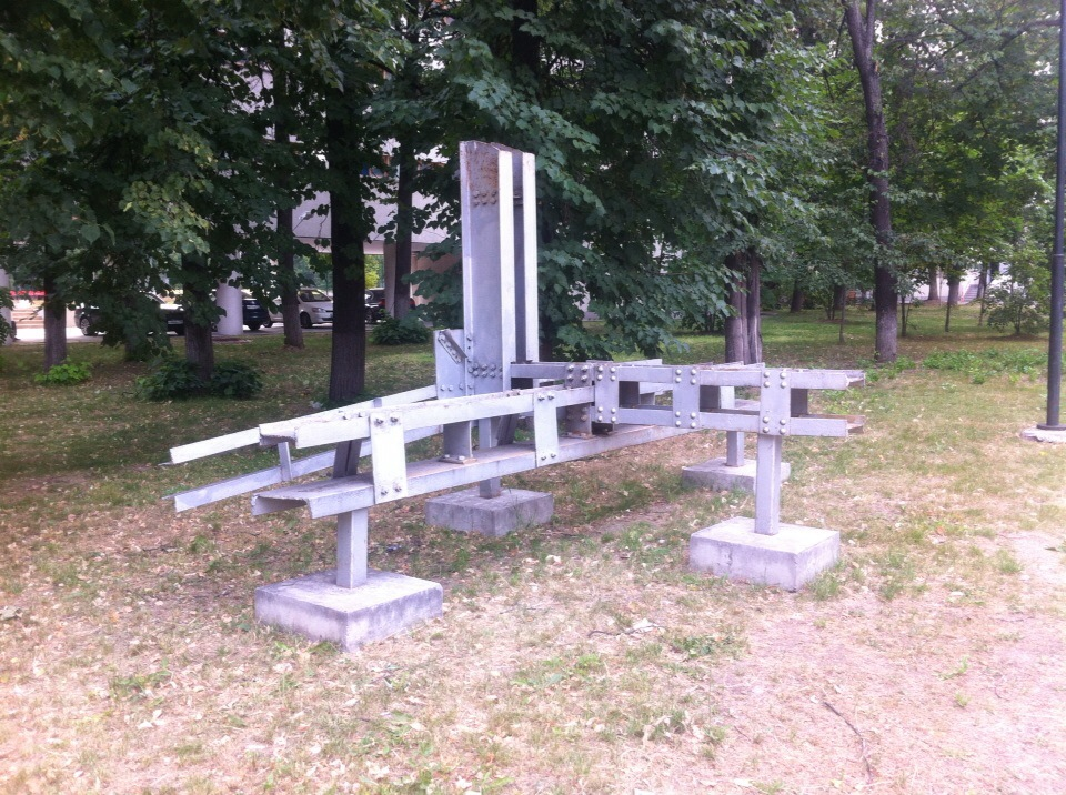 Фрагмент металлического каркаса Дома-коммуны на улице Орджоникидзе в Москве. Июнь 2018 года.